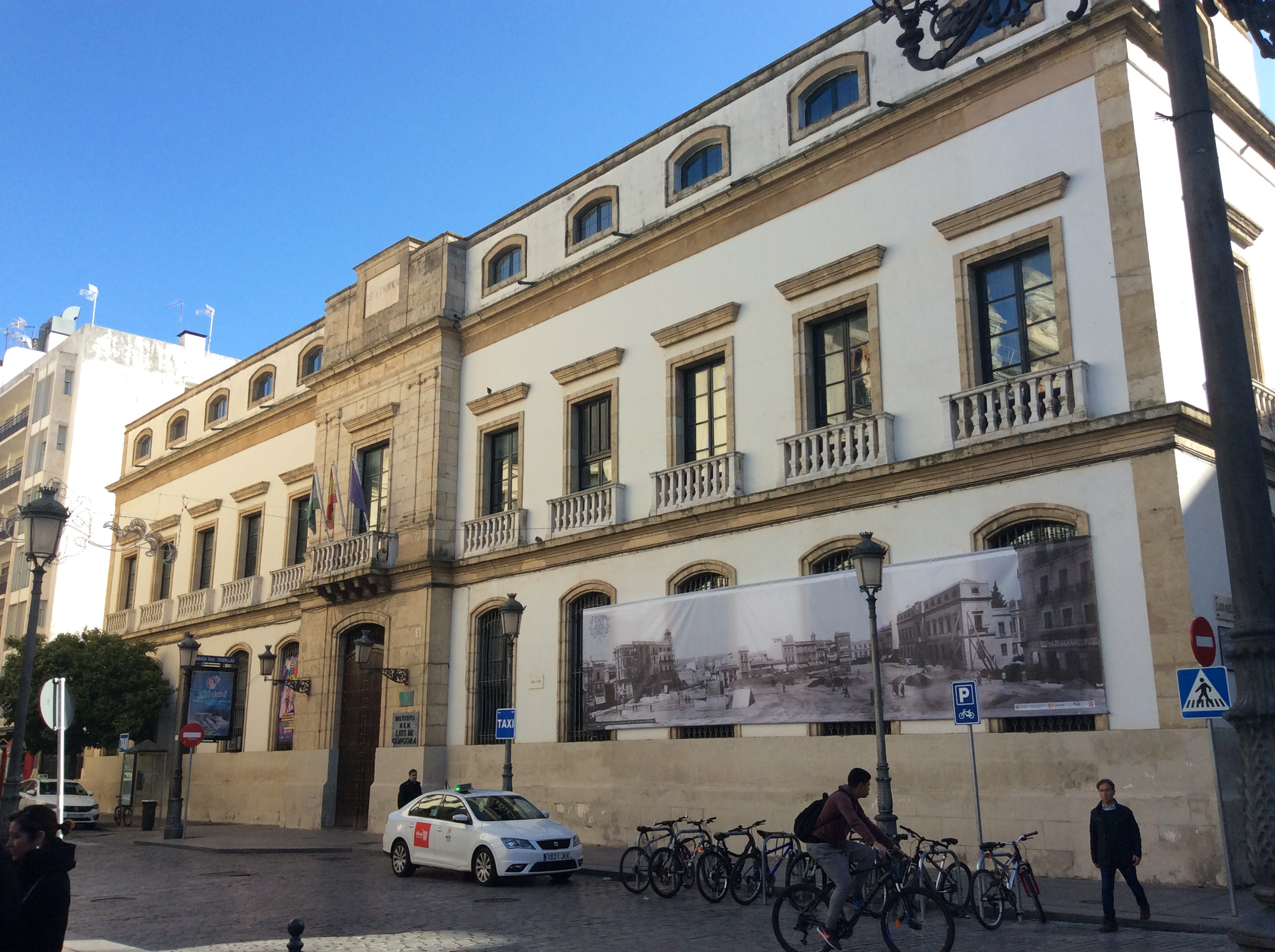 Instituto de Educación Secundaria Luis de Góngora. Imagen tomada desde la plaza de las Tendillas (Córdoba, España)